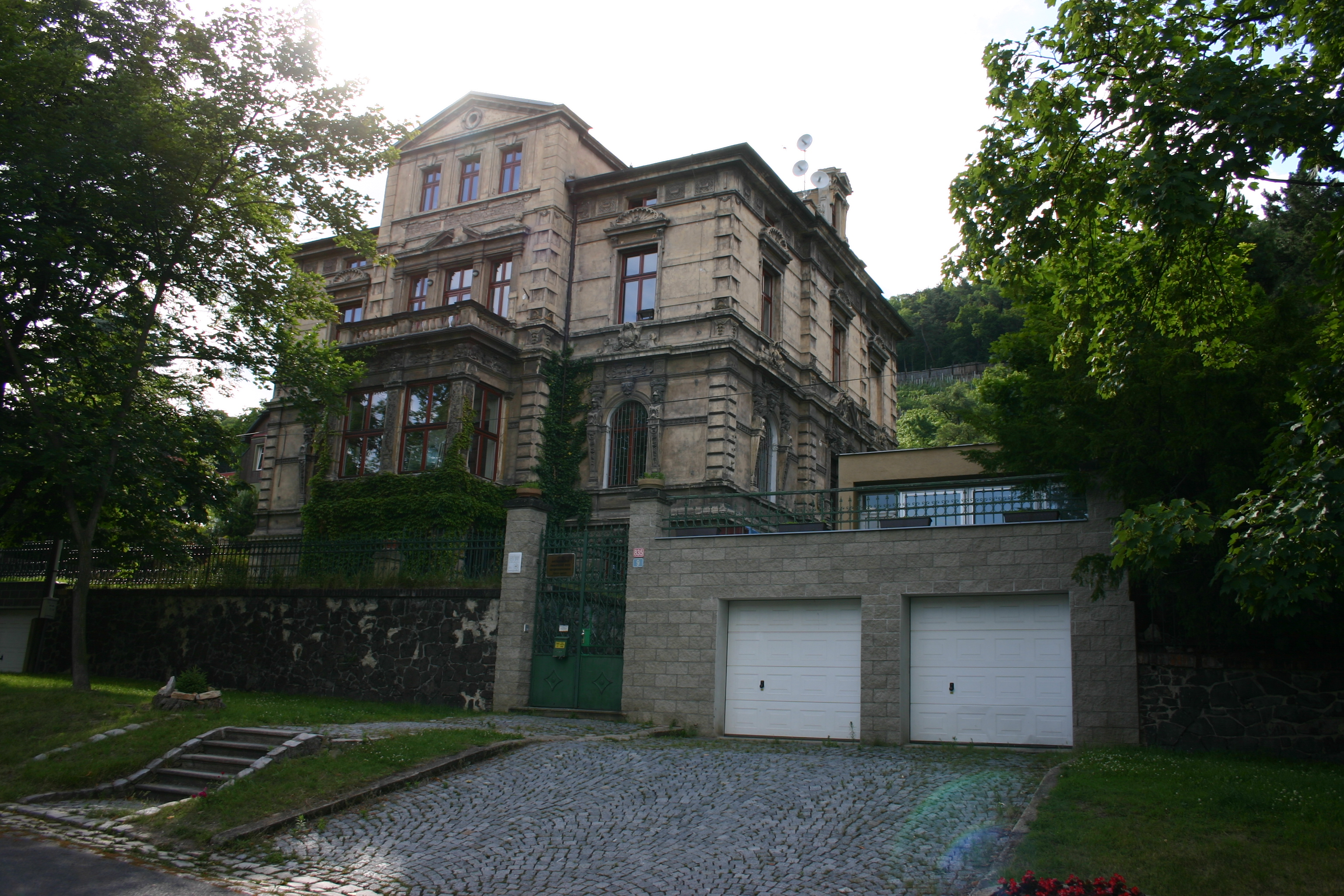 Ústav archeologické památkové péče severozápadních Čech v Mostě - sídlo, ulice Žižkova